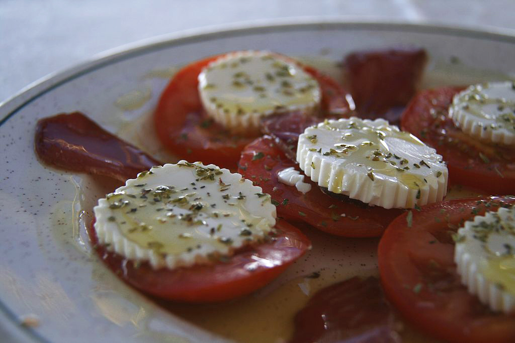 Ensalada de tomate y queso fresco con orégano. (Valencia)